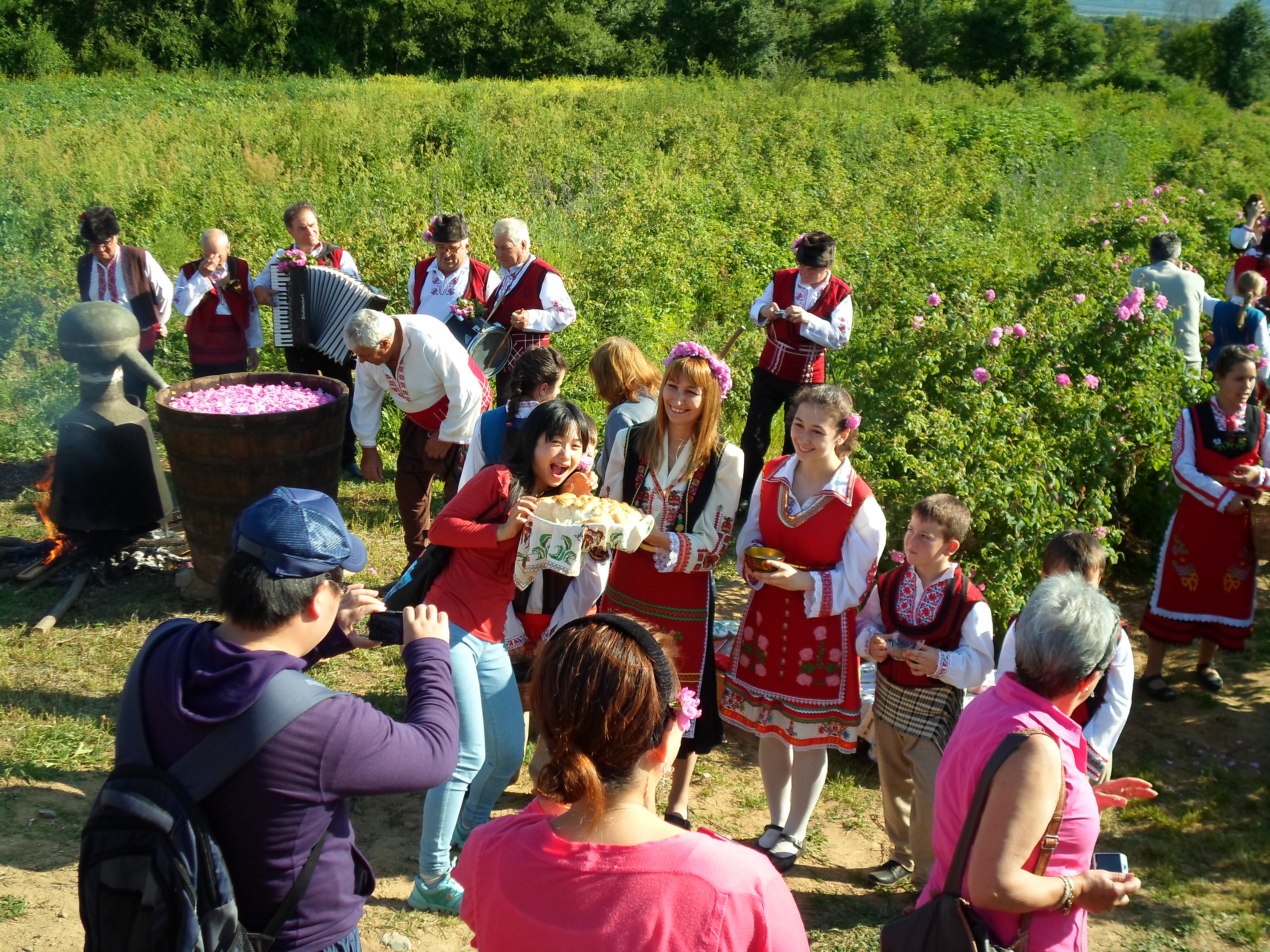 Розобер в с. Розово, 2014 г. с традиционното японско присъствие.